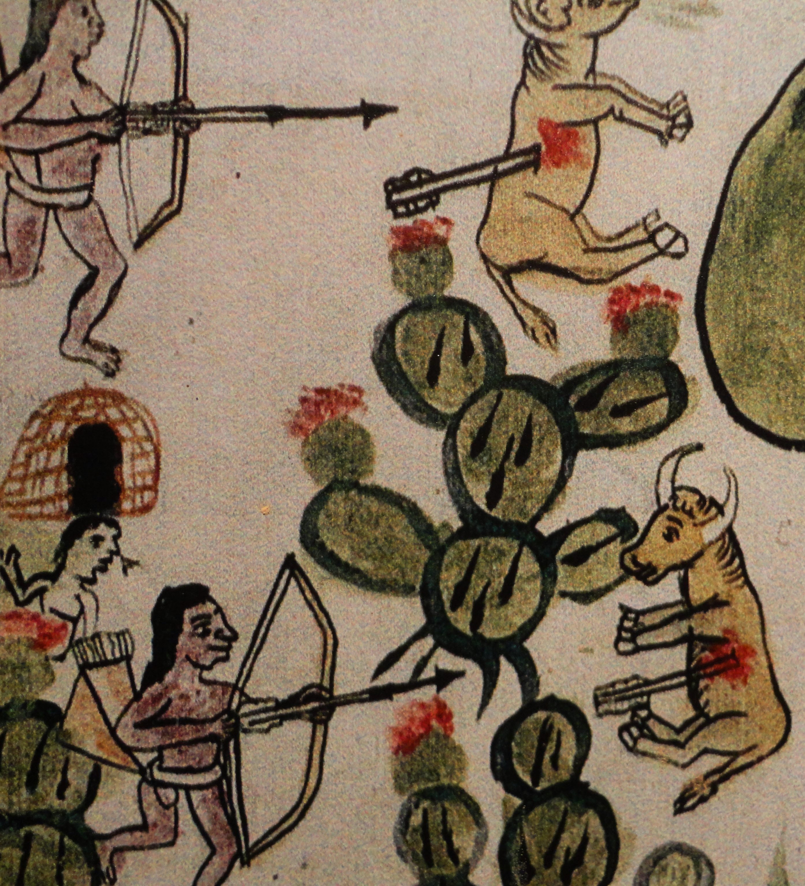 Detalle de Mapa de San Miguel y San Felipe de los Chichimecas (1580). Biblioteca de la Real Academia de Historia, Madrid, España.